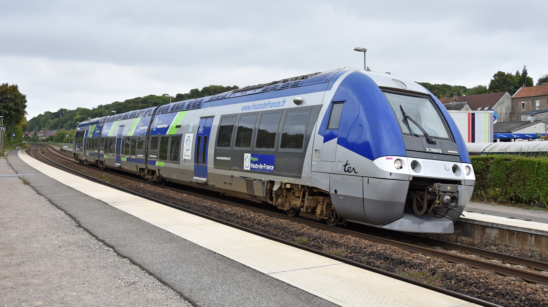 X 76603/04 à Ailly-sur-Somme